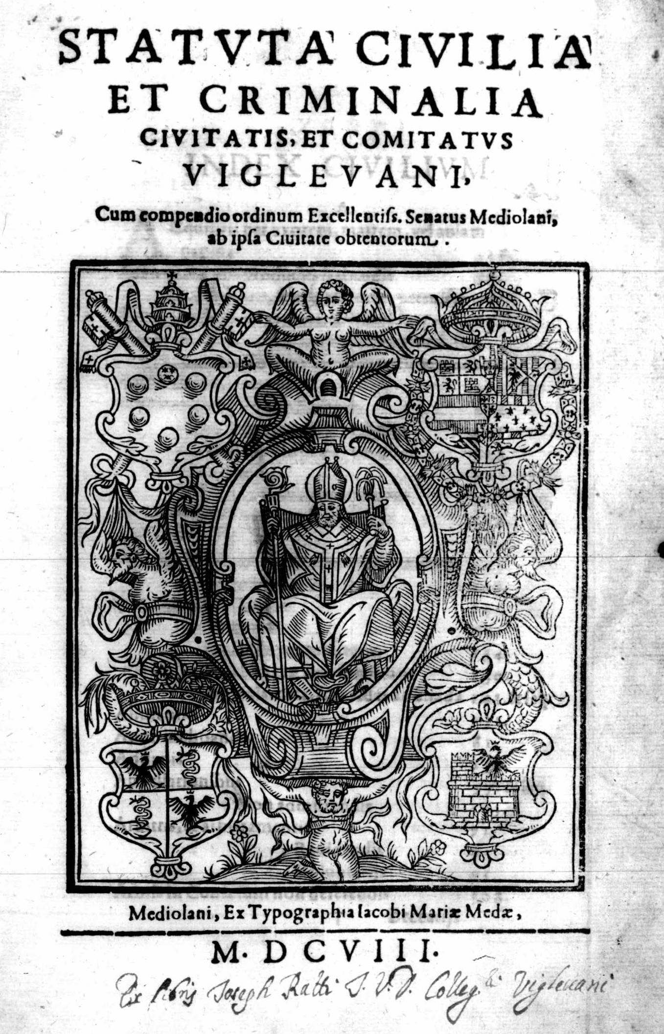 carta